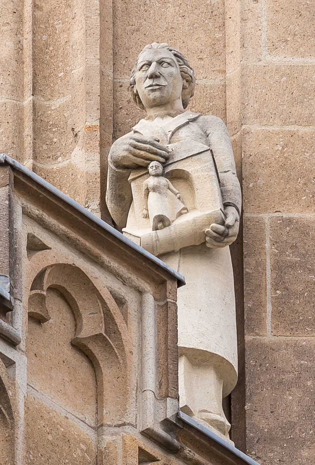 Figur der Amalie Lauer.